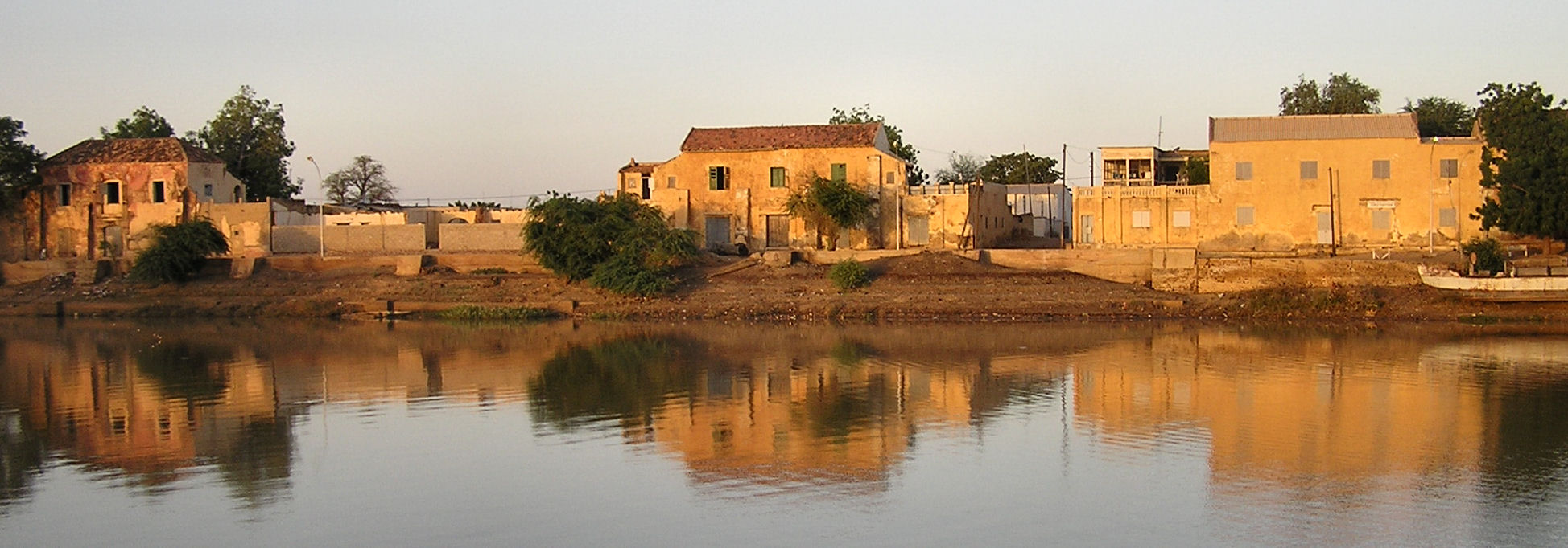 L'ancien comptoir commercial de Podor